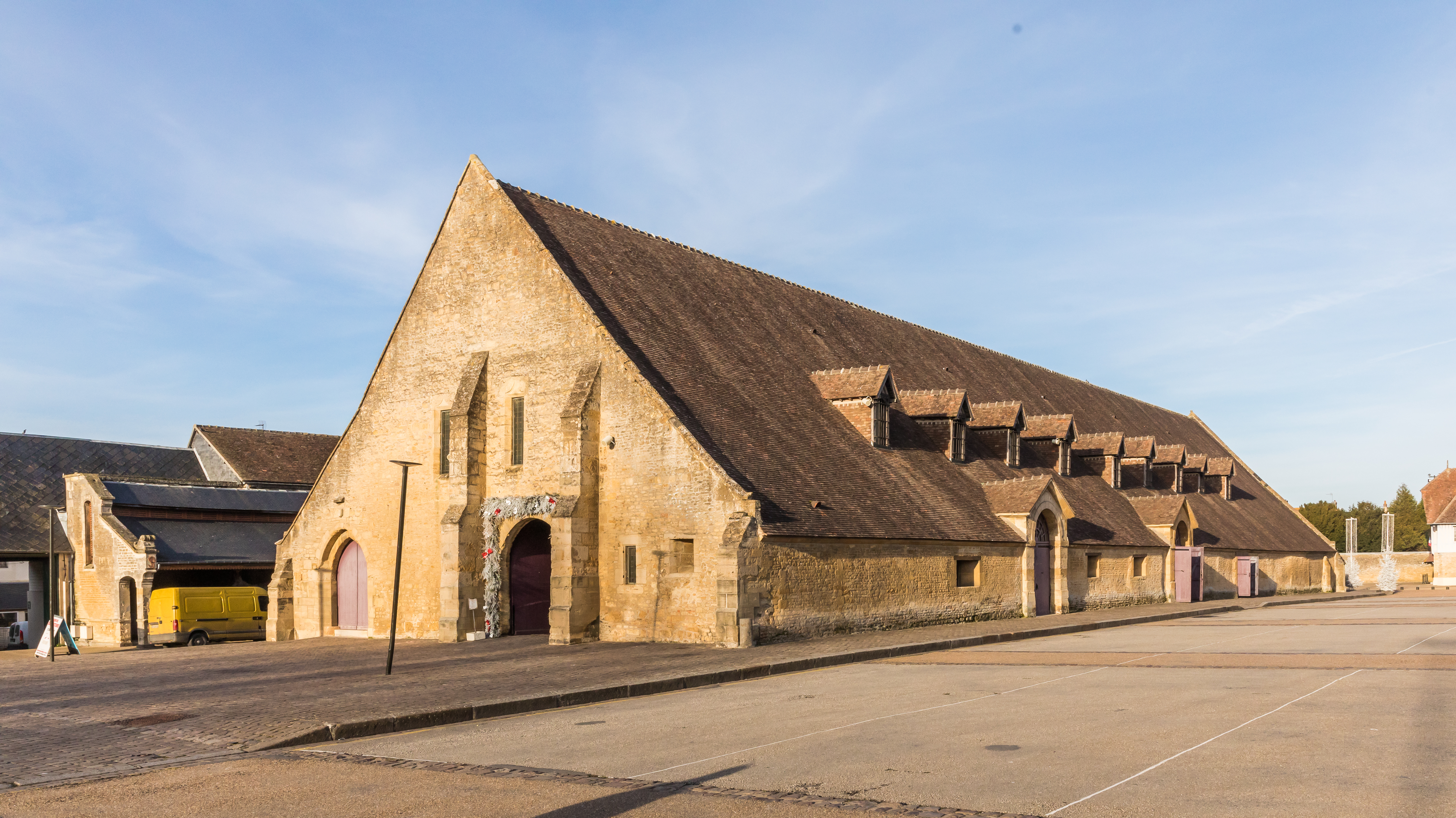 Halles de Saint-Pierre-sur-Dives